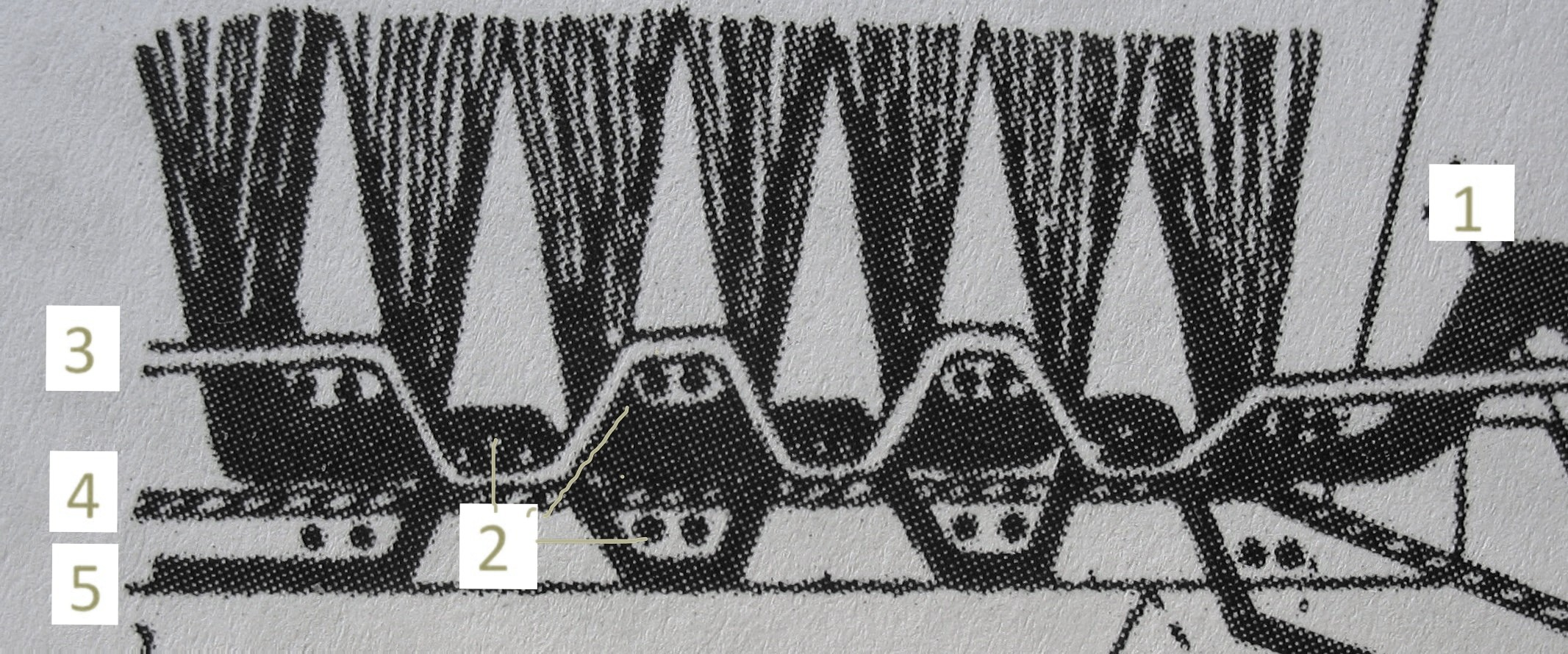 Struktura koberce tkaného na ze skřipcovém axminsteru